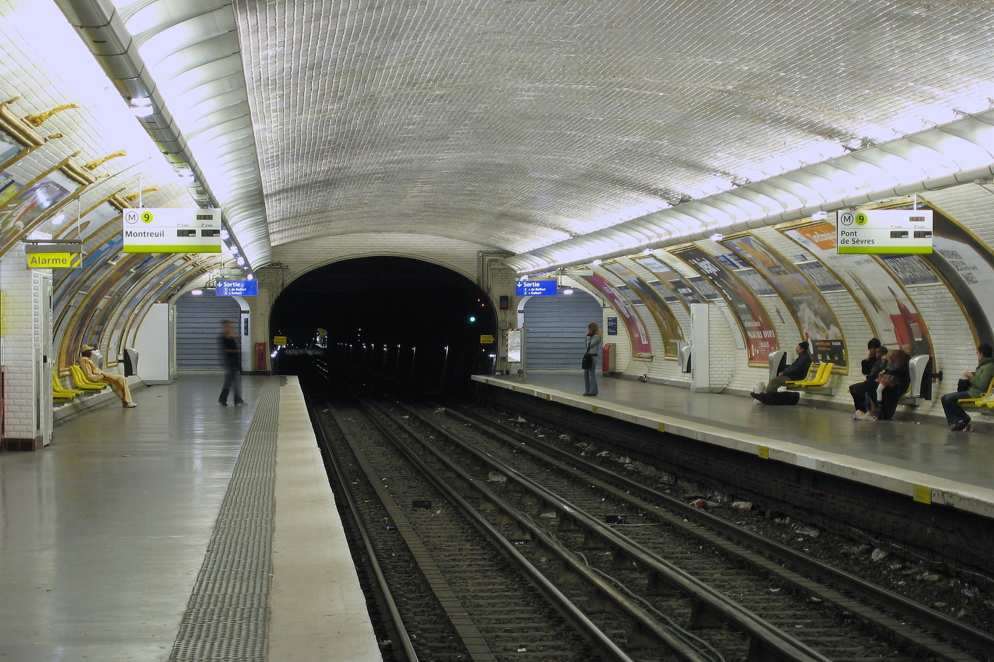 Quais de la station de métro parisienne Charonne, en direction de Pont de Sèvres.